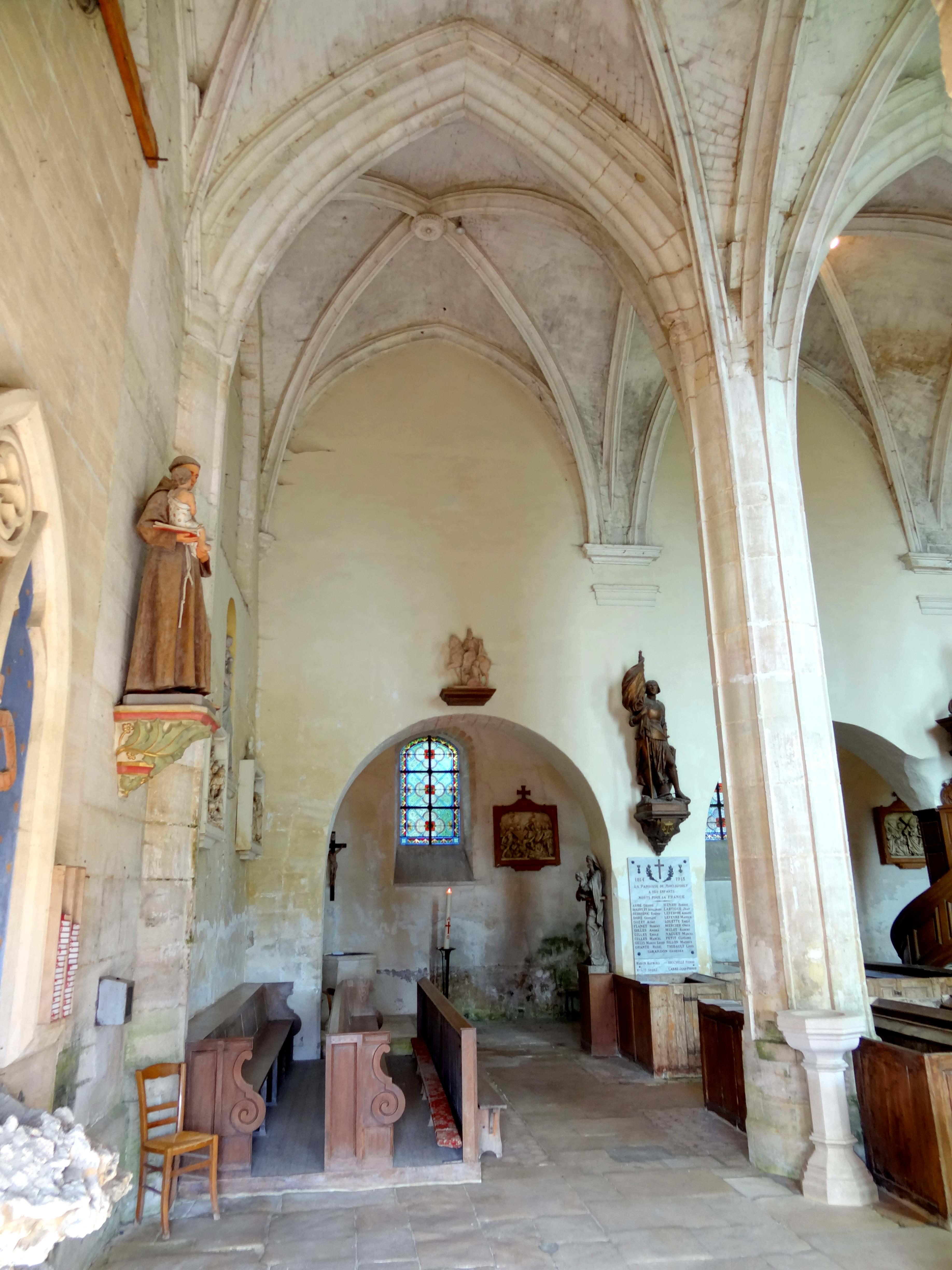 Intérieur de l'église - voir titre.